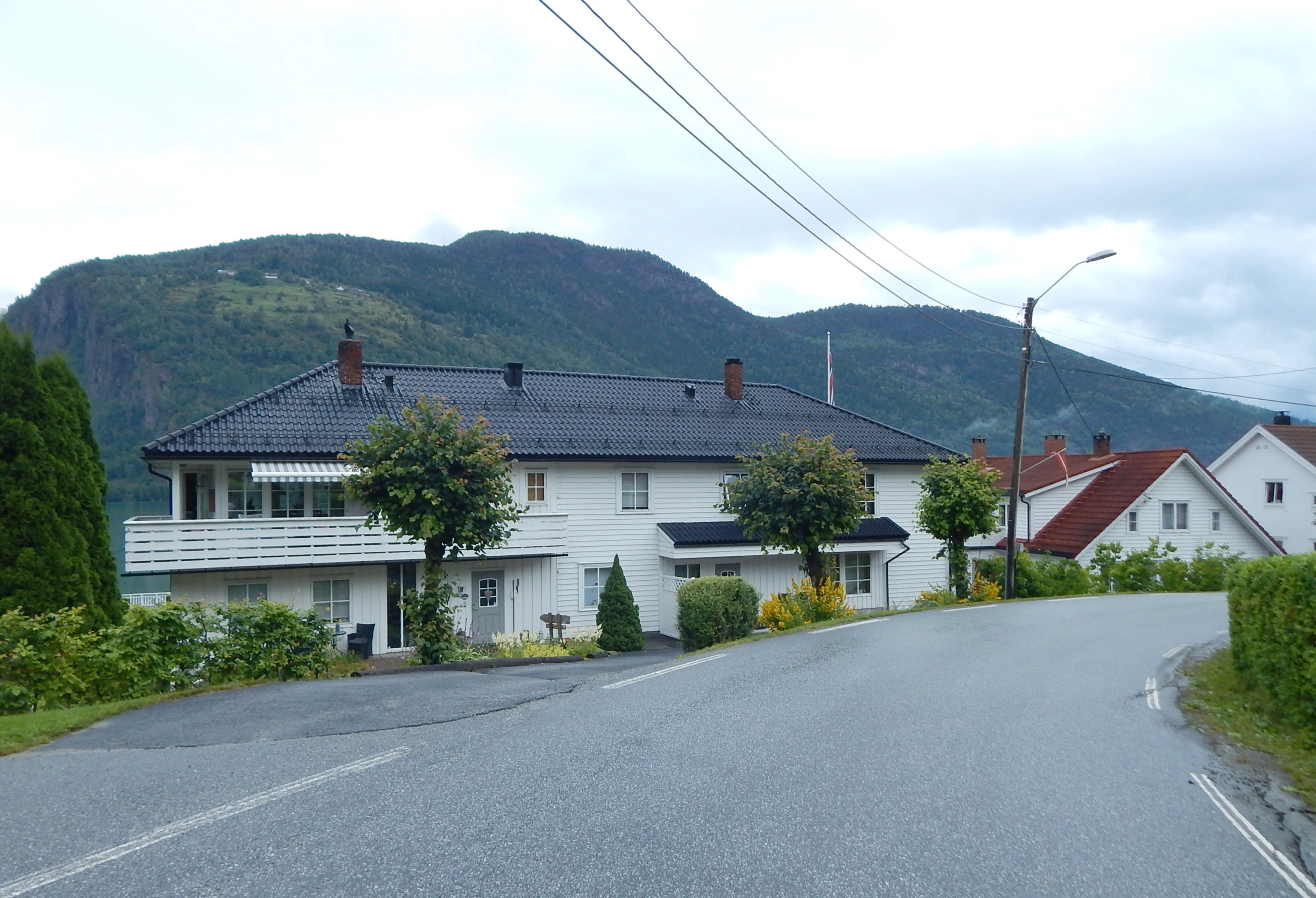 Primær fylkesvei 603 gjennom Marifjøra